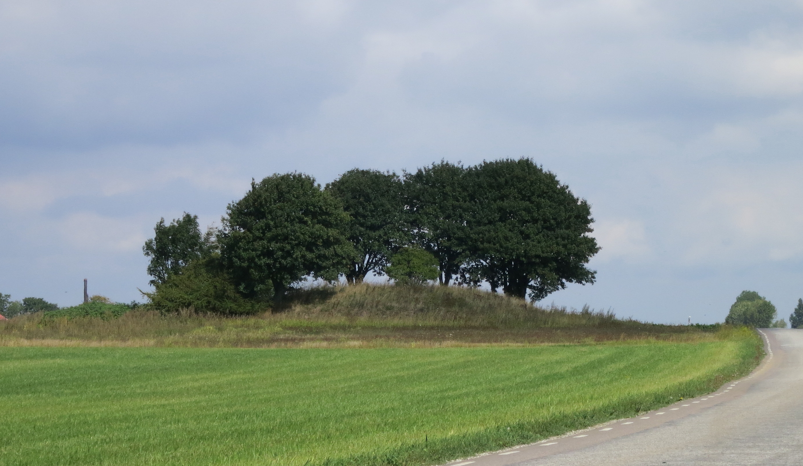 Gravhögen Kashög i Tygelsjö socken, Malmö kommun